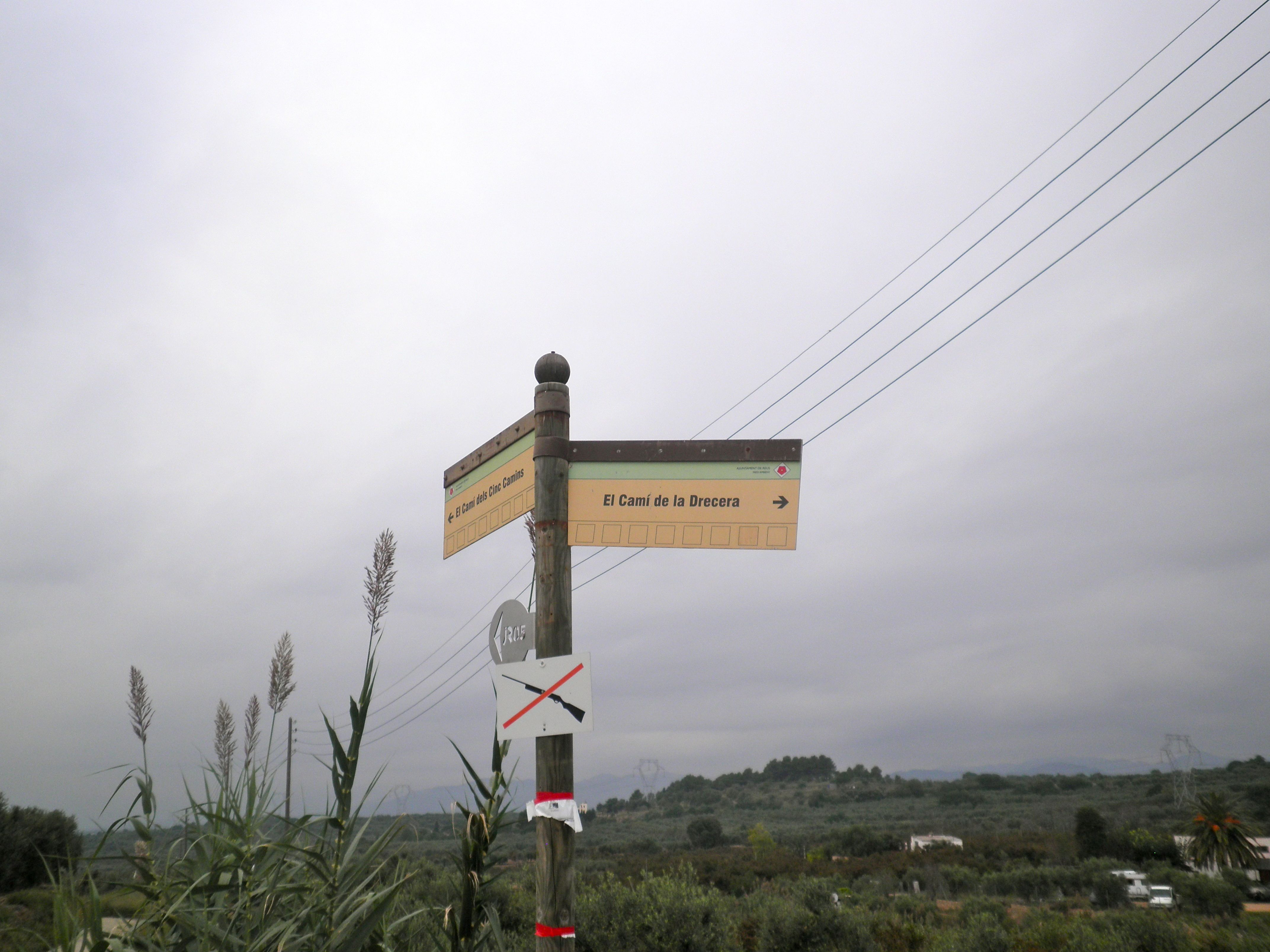 El camí de la Drecera als Cinc Camins